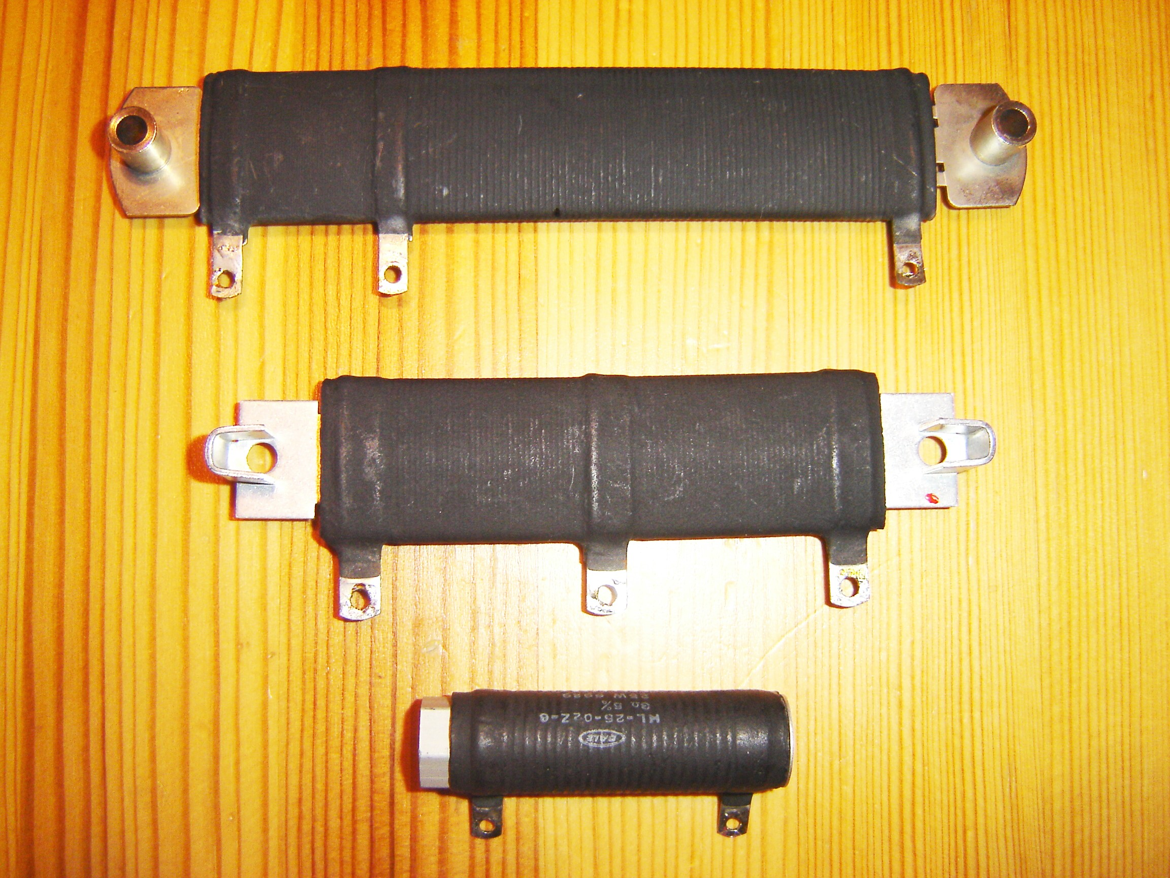 Drahtwiderstand